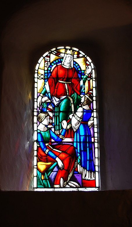 Un vitrail de E. Linck à Wimmis (reine Berthe, 1924)